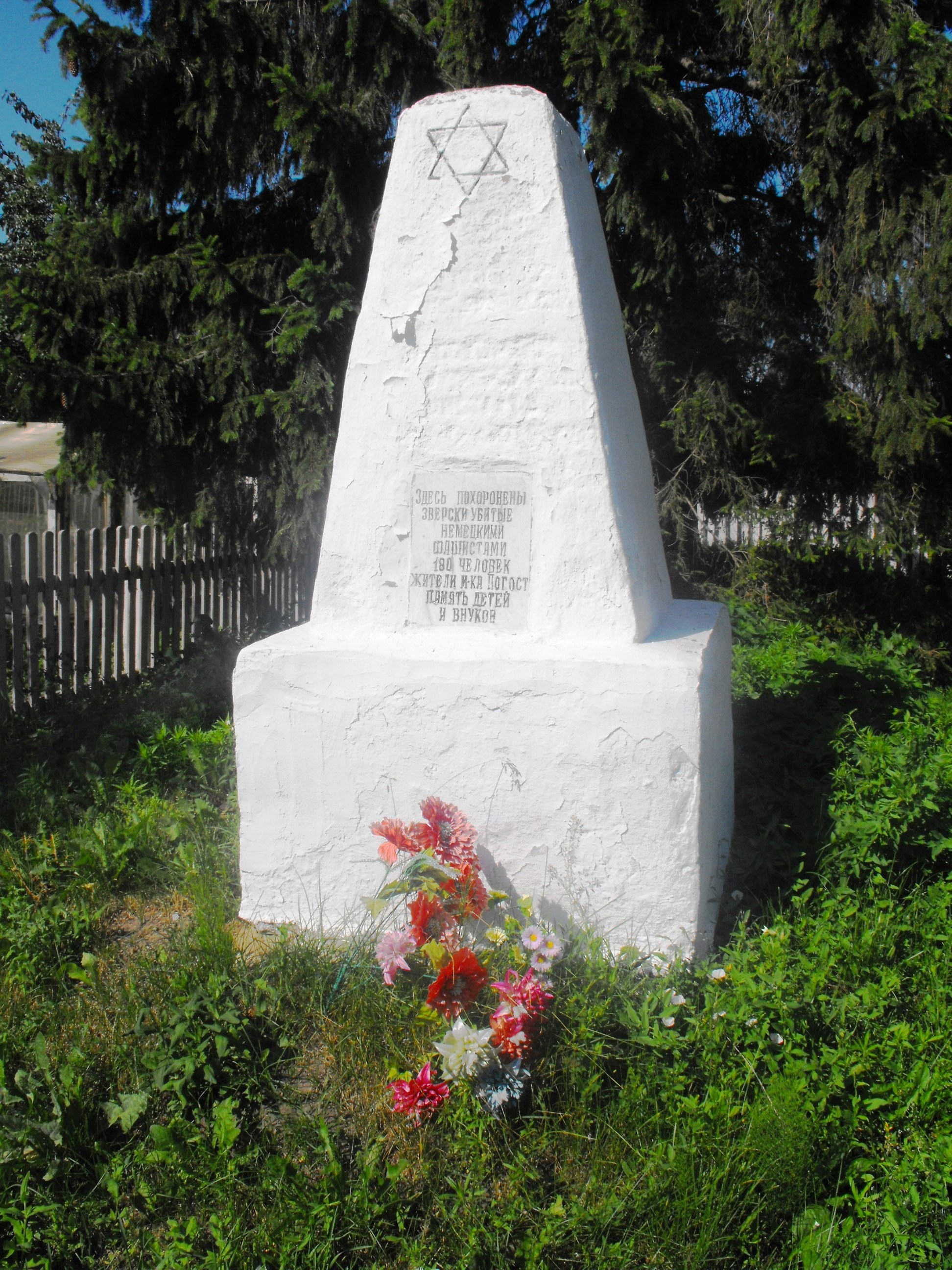 Один из двух памятников на братских могилах евреев деревни Погост Солигорского района Беларуси, убитых во время Холокоста. На табличке с надписью указано число убитых - 180 человек.